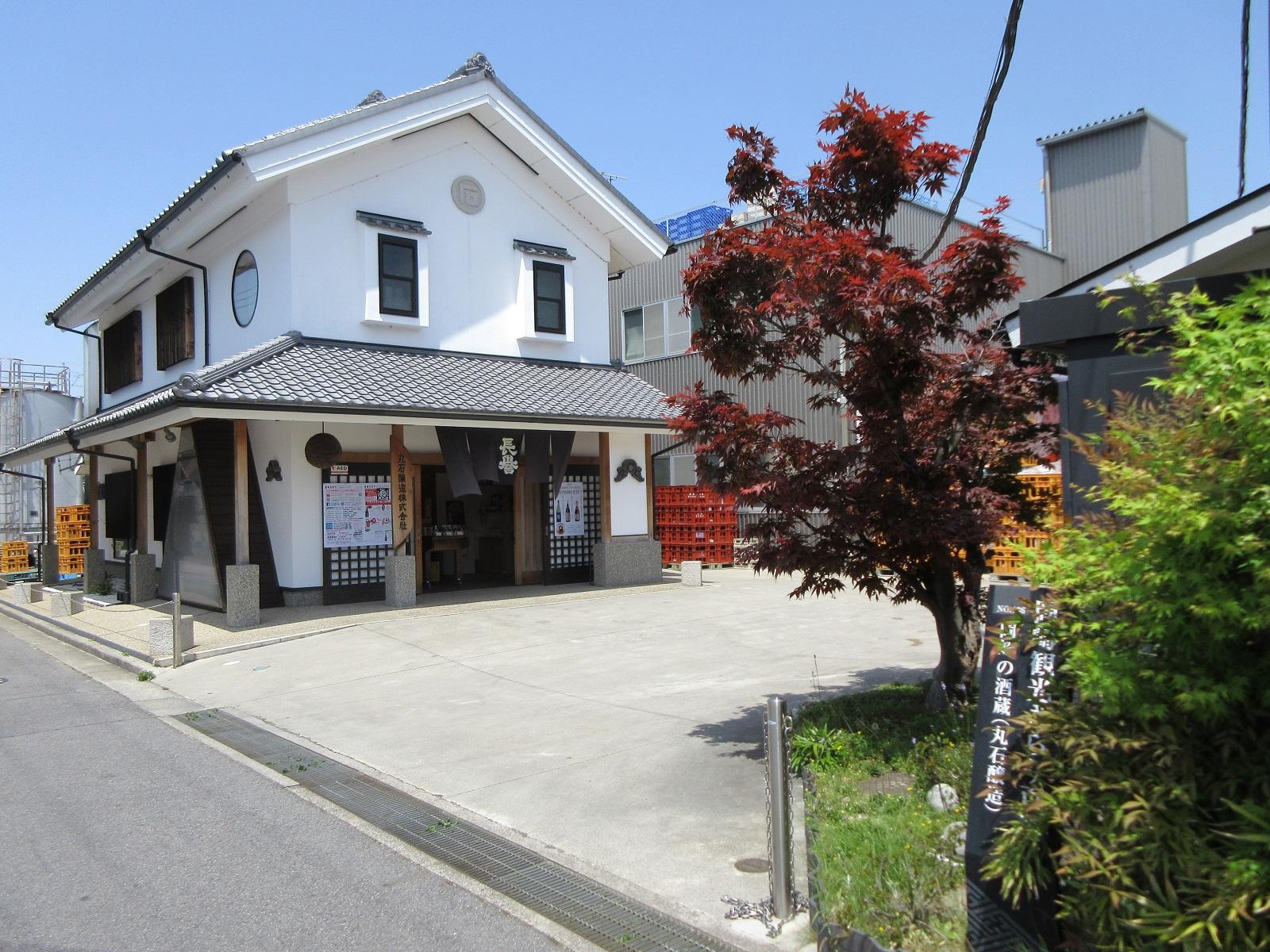 丸石醸造株式会社（愛知県岡崎市中町）